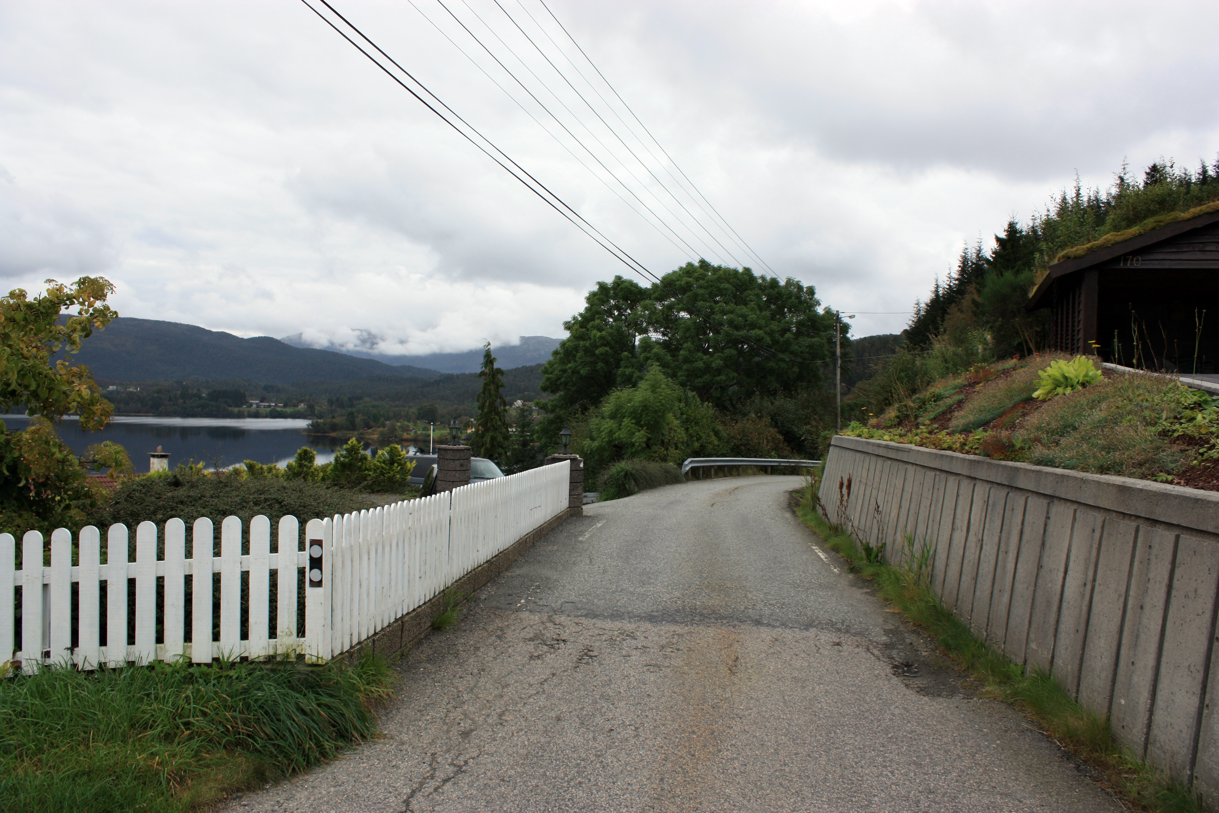 Kismulvegen, Fana, Bergen.